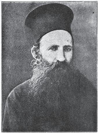 Иван Антонов.